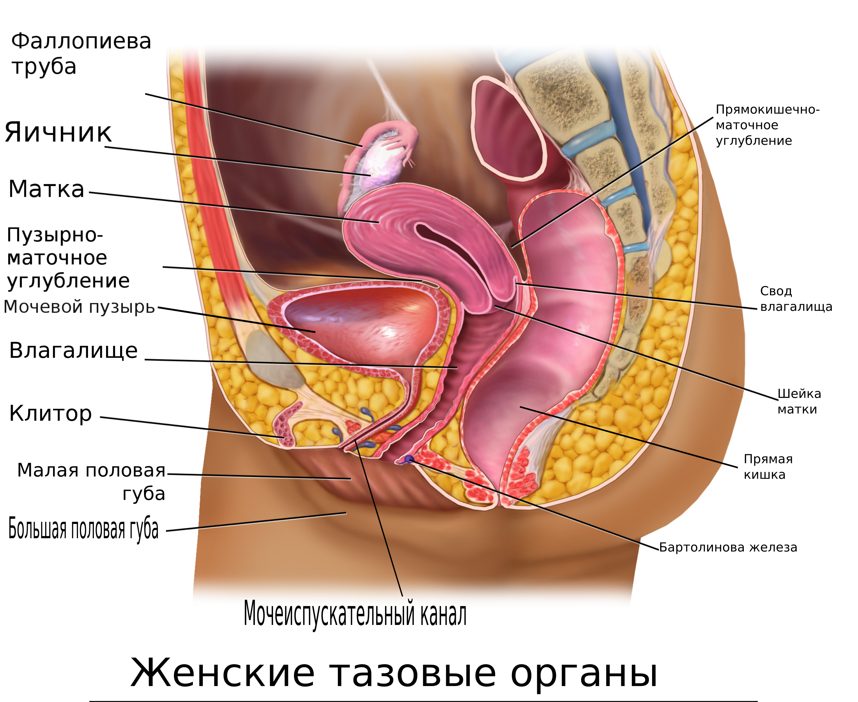 Репродуктивная система (внутренние и наружные половые органы) женщины и смежные тазовые органы (нижние отделы мочевыделительной и пищеварительной систем) в продольном разрезе (вид сбоку).